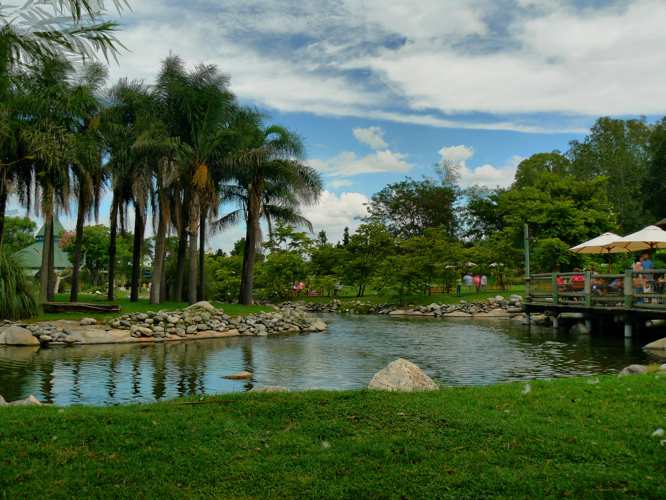 Temaiken Safari Park, Escobar, Buenos Aires Province, Argentina.